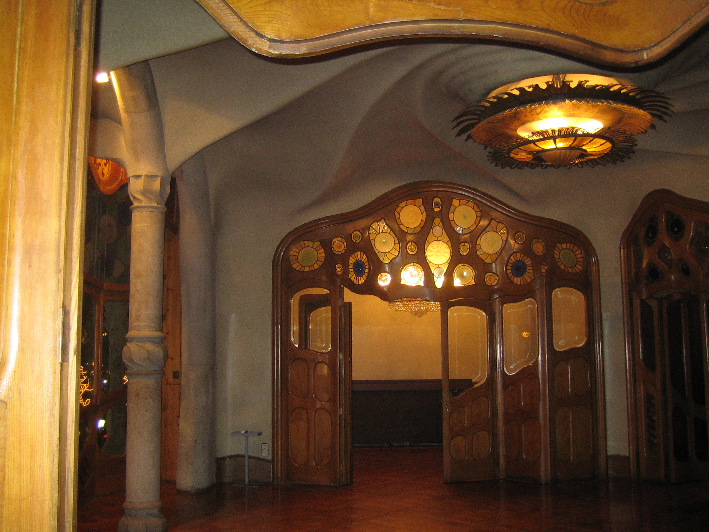 Photo d'intérieur du salon de la Casa Battlo (Barcelone) ; architecte Antonio Gaudi. Je suis l'auteur de cette photo.